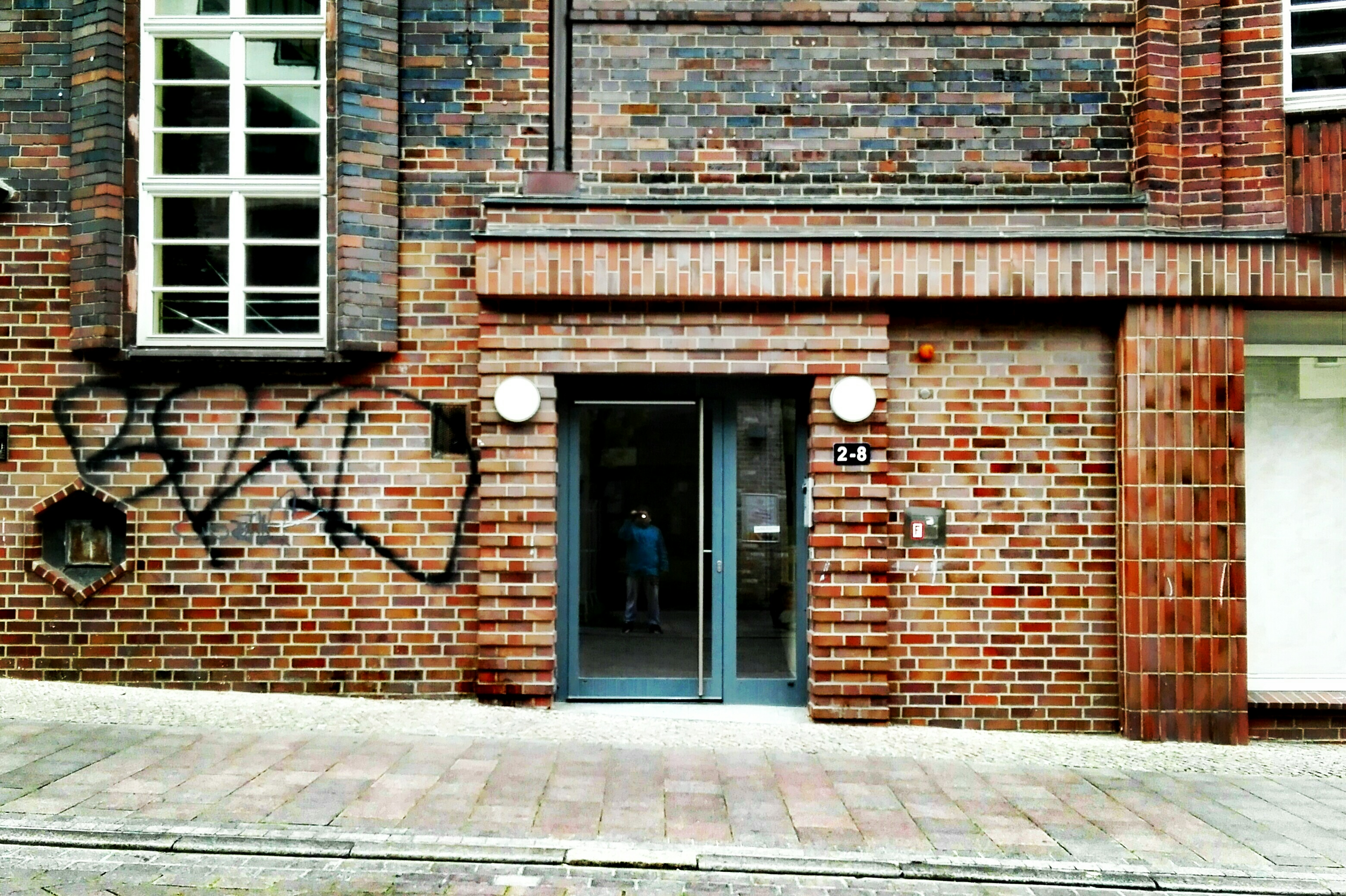 Einstiger Personaleingang des Kaufhauses in der Sandstraße. Heute ist es wieder in der Schmiedestraße 2-8. Man gelangt über ihn zu den in Wohnungen gewandelten Kaufhausbereich.